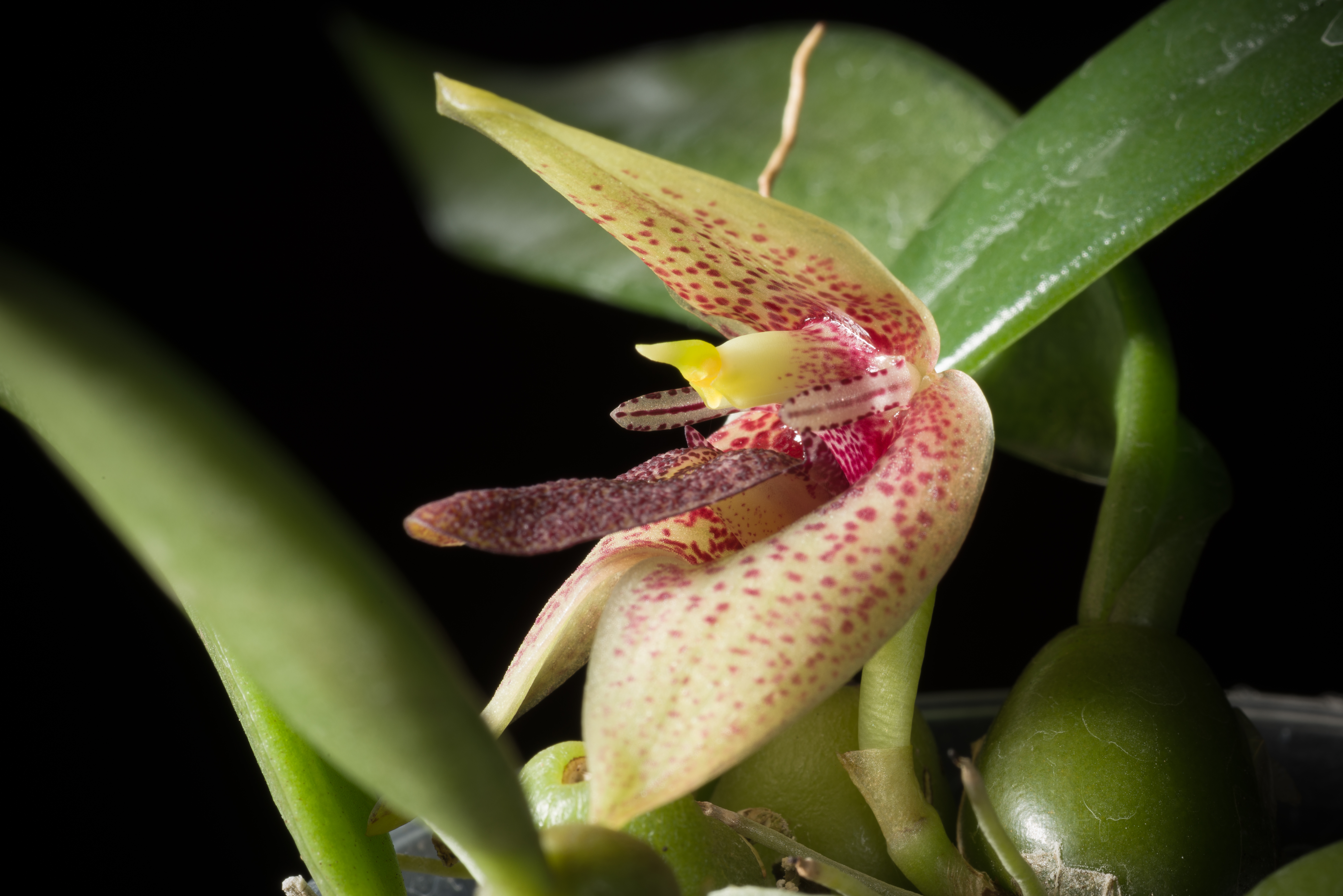 Bulbophyllum disciflorum